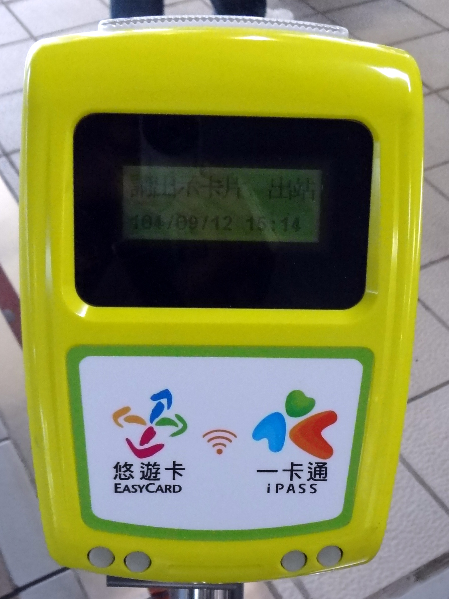 台北捷運某車站設置的悠遊卡及一卡通讀卡機。